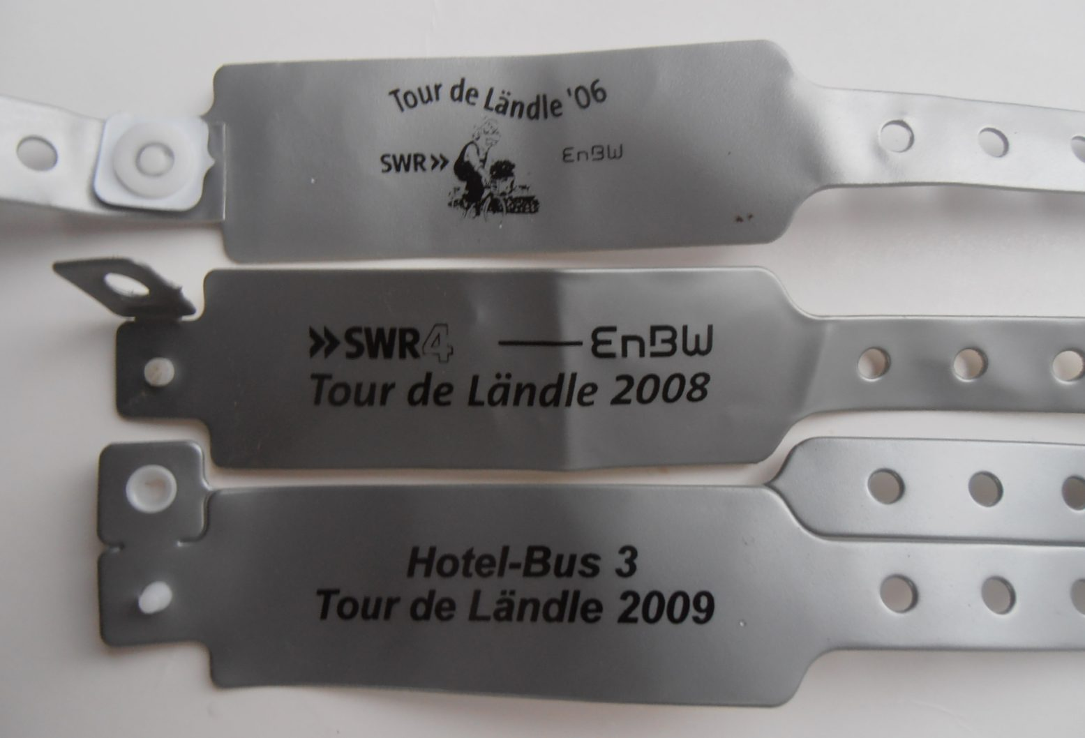 Verschiedene "Bändel" von der Tour de Ländle 2006: abgeschnittenes Teilnehmerband 2008: geöffnetes Teilnehmerband 2009: zwei unbenutzte Bänder für Sonderberechtigung